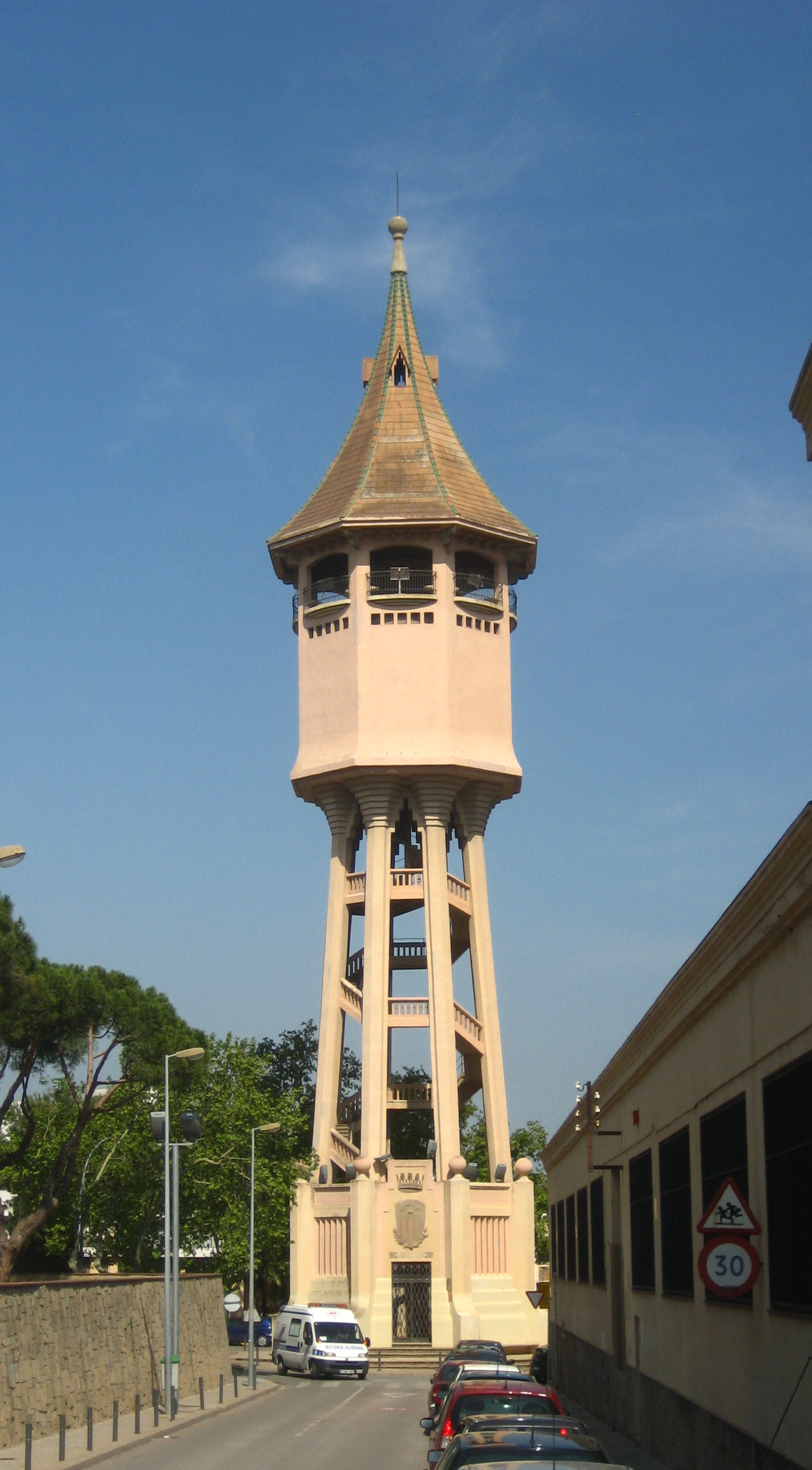 Torre de l'Aigua, old water cistern in Sabadell, Catalonia.